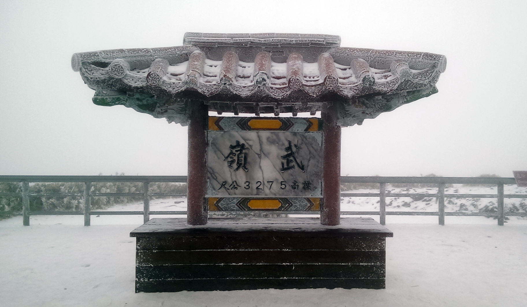 中文（台灣）: 太魯閣國家公園武嶺雪景